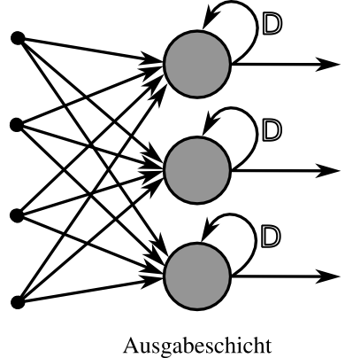 Schema eines künstlichen neuronalen Netzes mit einer Ebene mit rekurrenten Kanten (D symbolisiert die zeitliche Verzögerung).